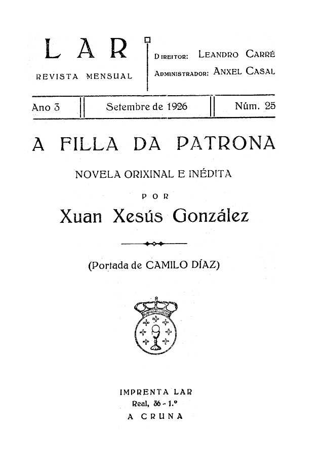 A filla da patrona, portada interior